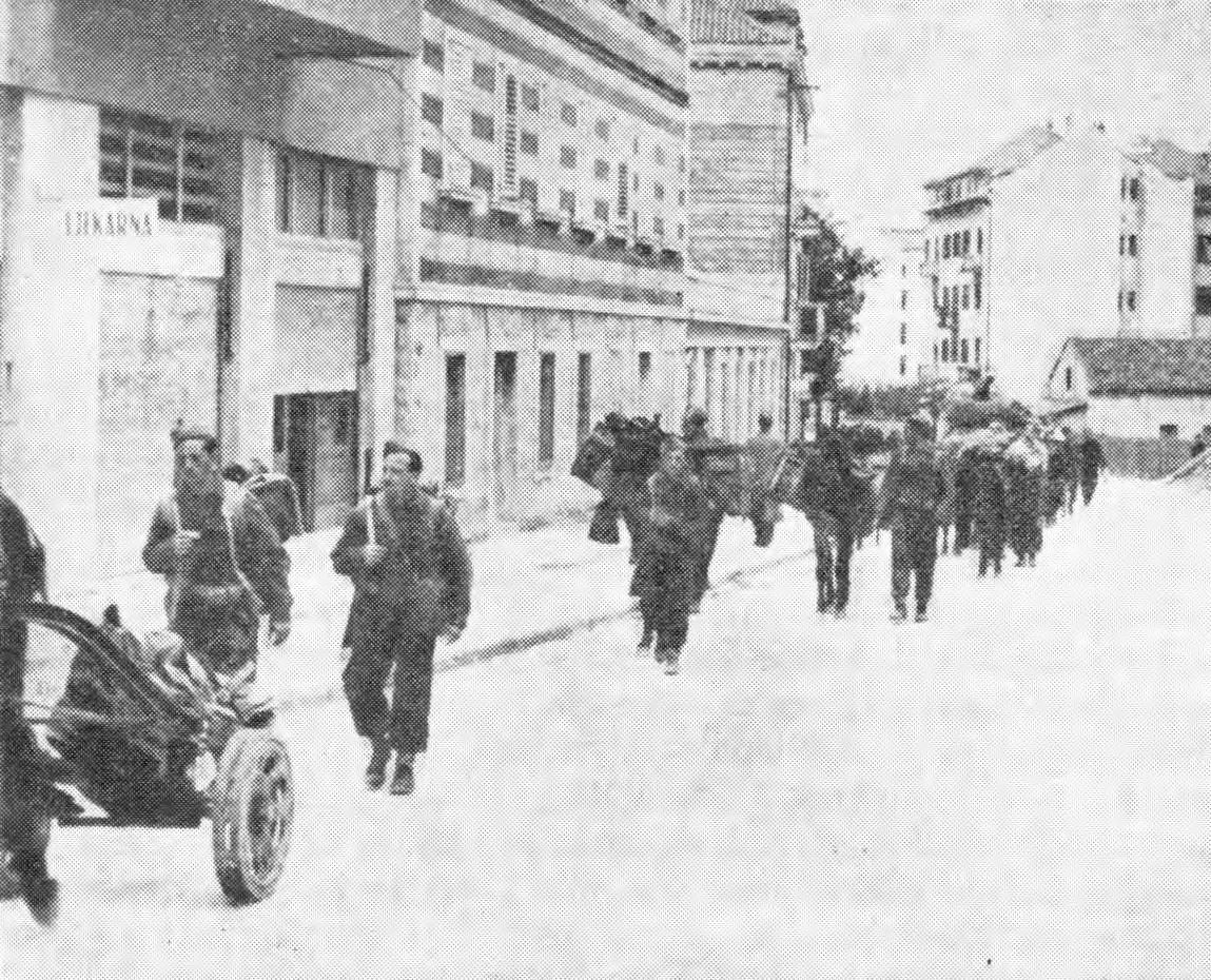 Vkorakanje partizanskih enot novembra 1944 v Šibenik.